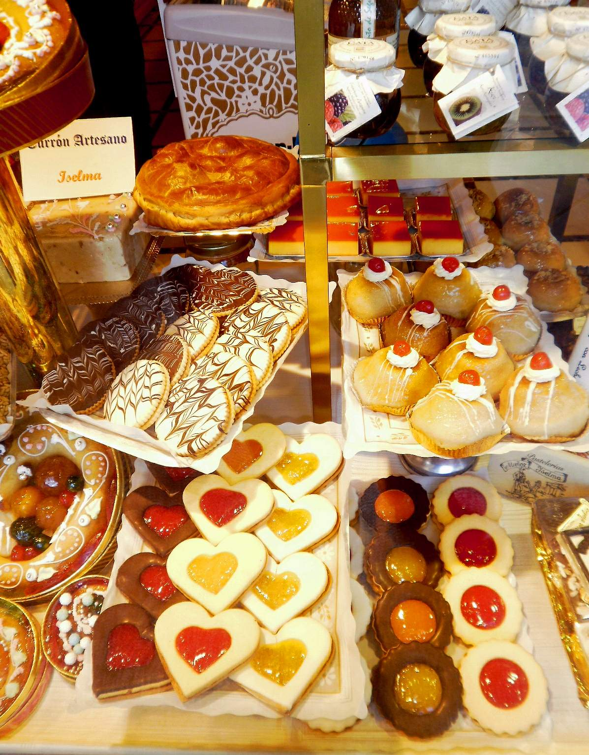 Repostería abulense